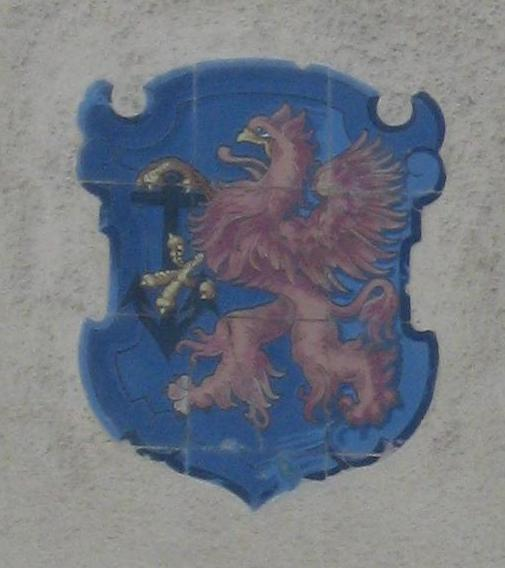 Herb Świnoujścia na Muzeum Rybołówstwa Morskiego w Świnoujściu.